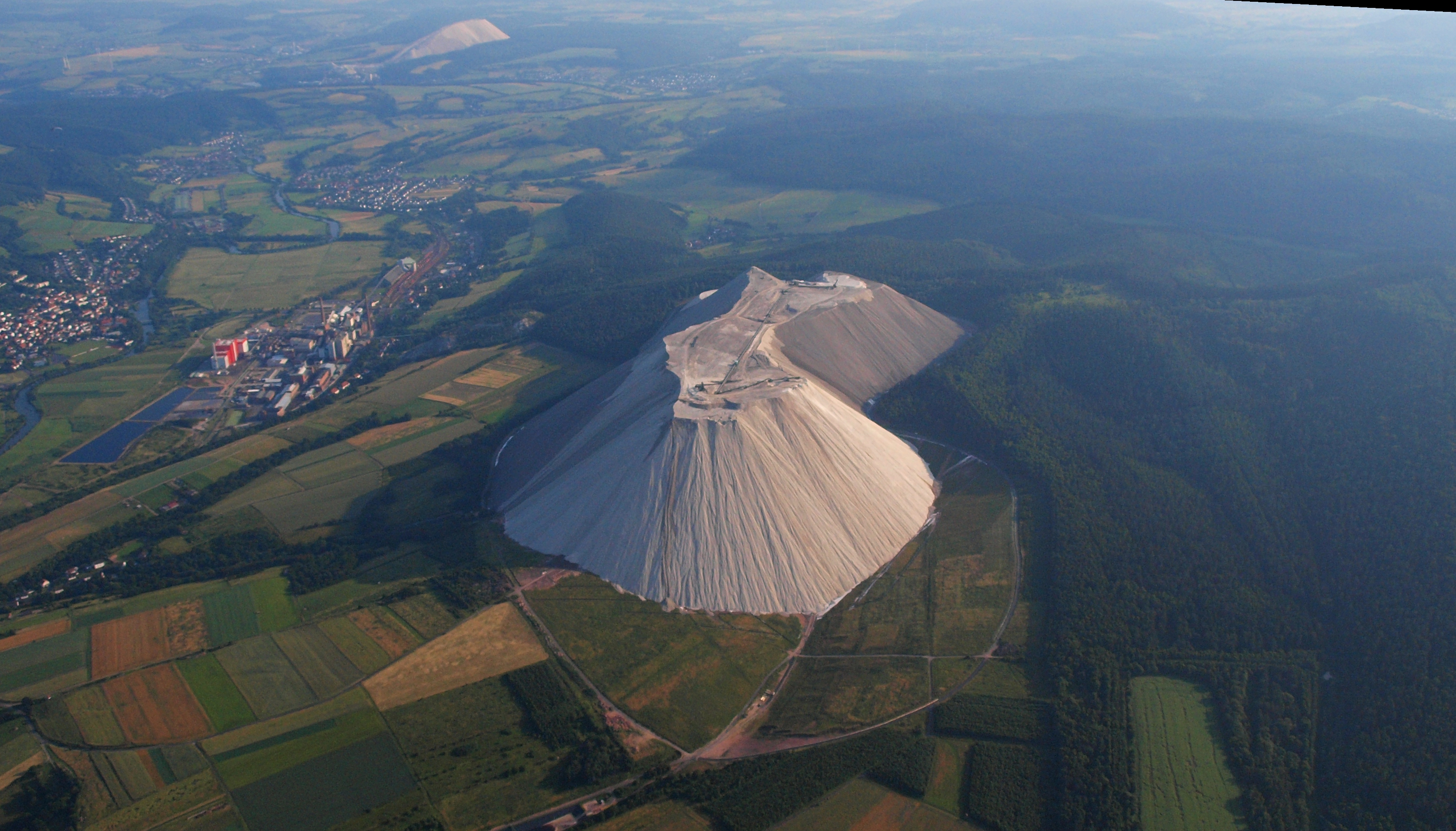 Heringen (Werra) – Monte Kali, im Hintergrund die Halde bei Philippsthal